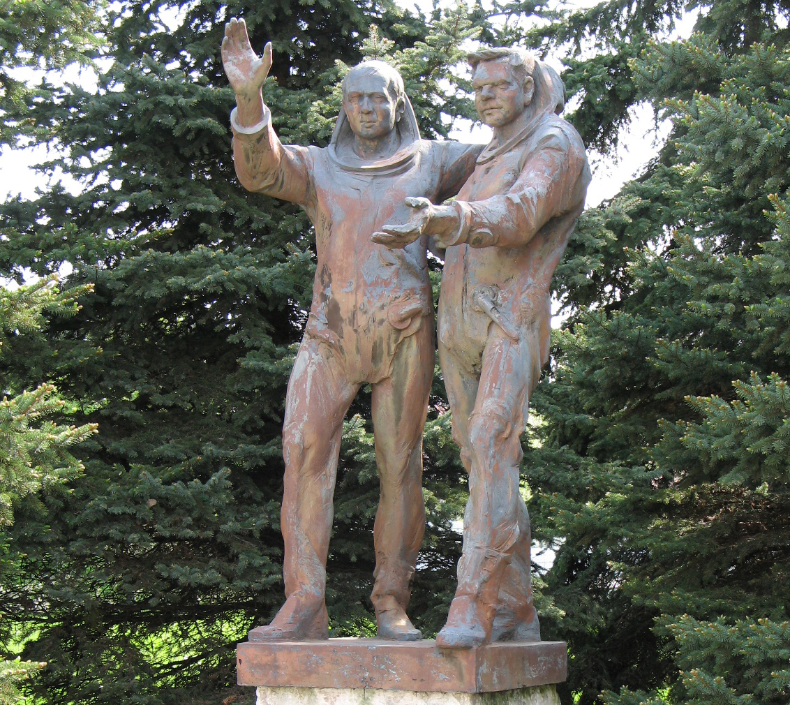 Prvý čs. kozmonaut Vladimír Remek v epoxidovom ruchu